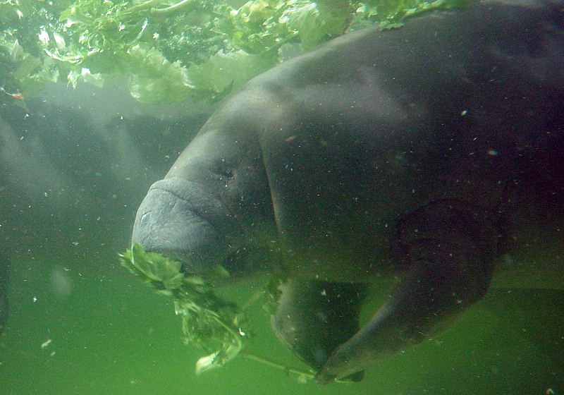 Karibik-Nagelmanati beim Fressen, Trichechus manatus, Tierpark Berlin, Deutschland, Germany